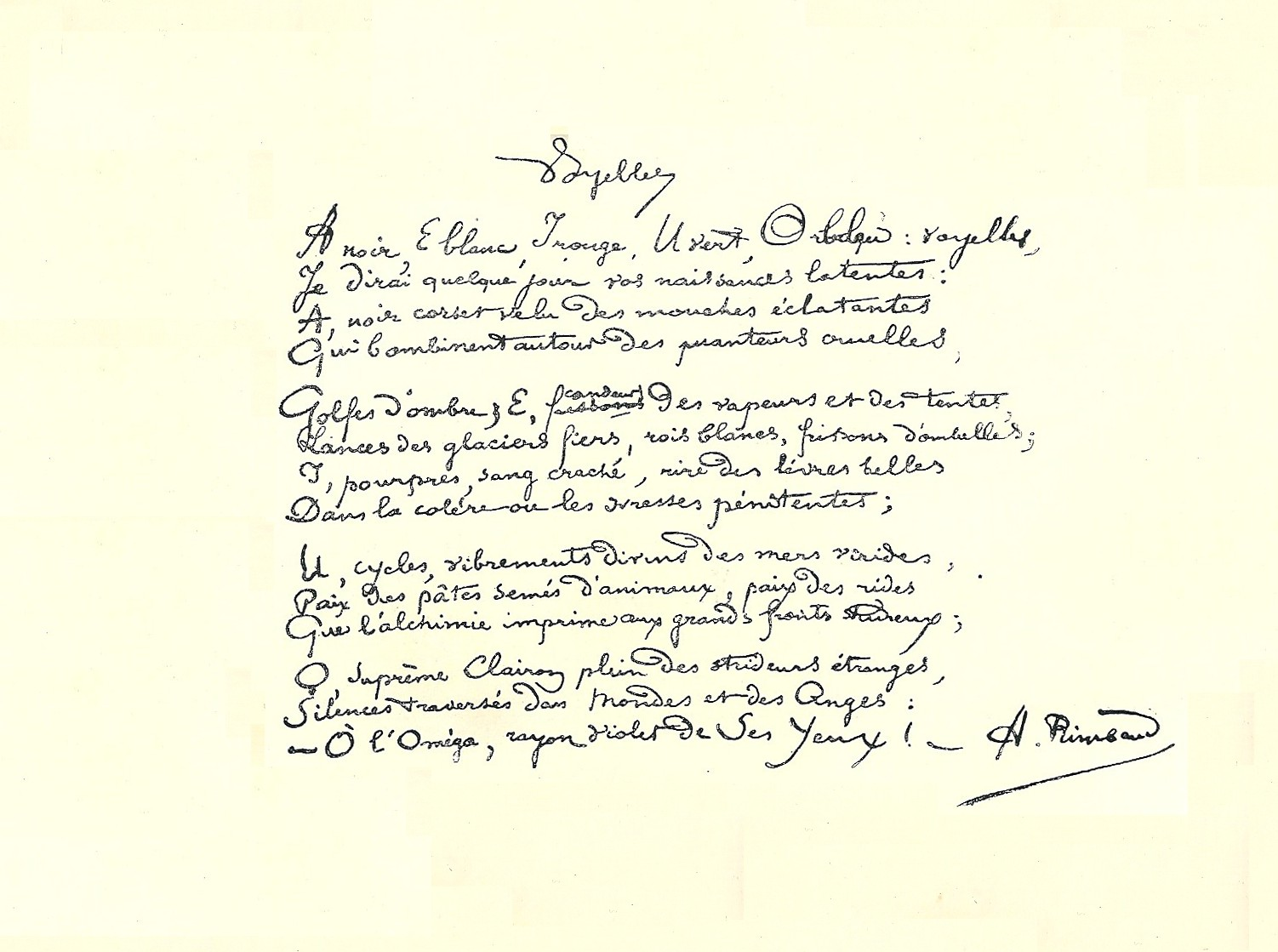 Rimbaud : manuscrit autographe du poème Voyelles (1871-1872) - Musée Rimbaud Charleville-Mézières - Photographié lors de l'exposition "Rimbaudmania", Paris